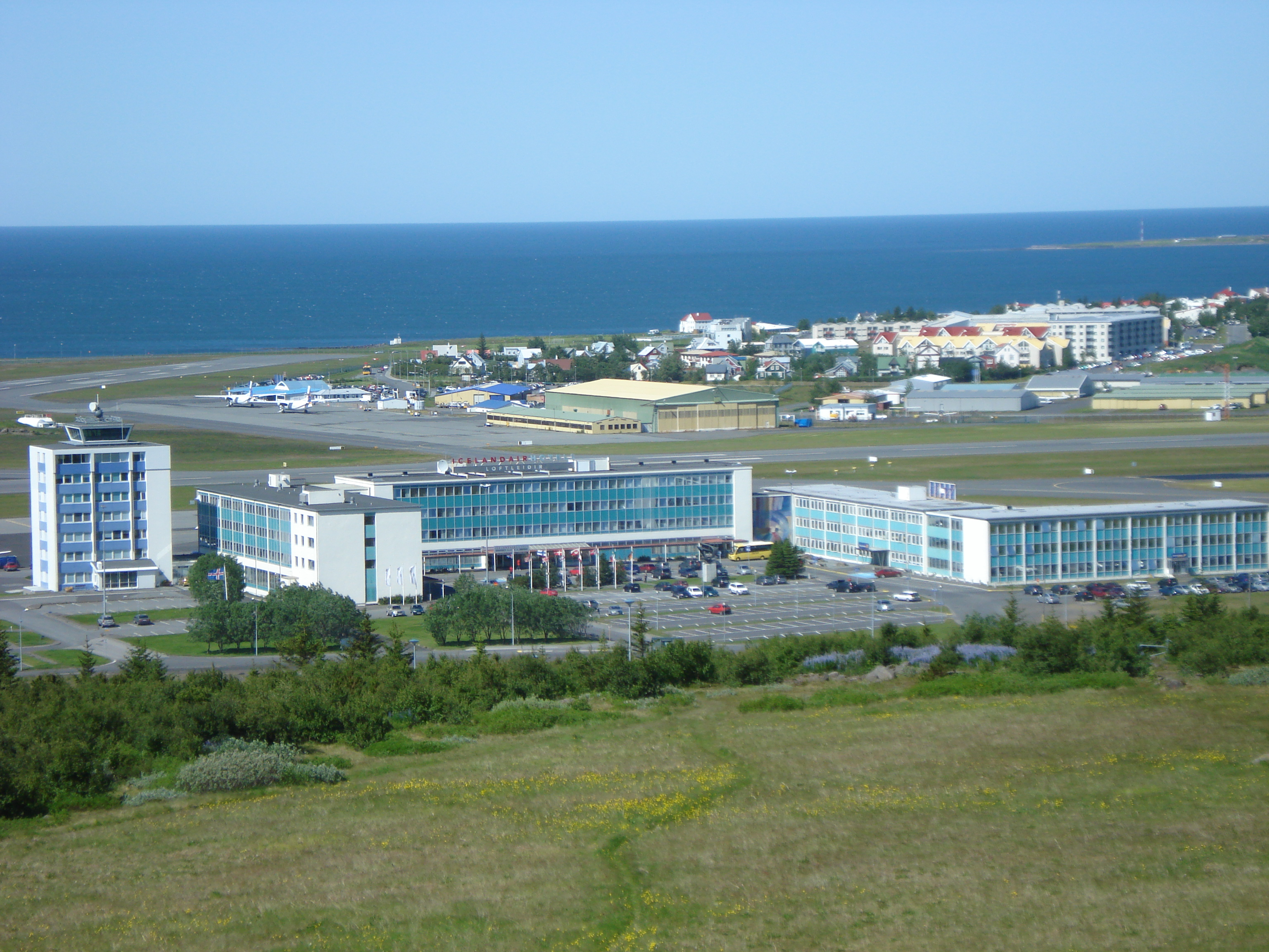 Hótel Loftleiðir